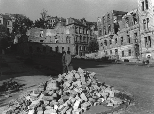 La casa de Sándor Márai bombardejada al Carrer Mikó (Budapest, 1945)